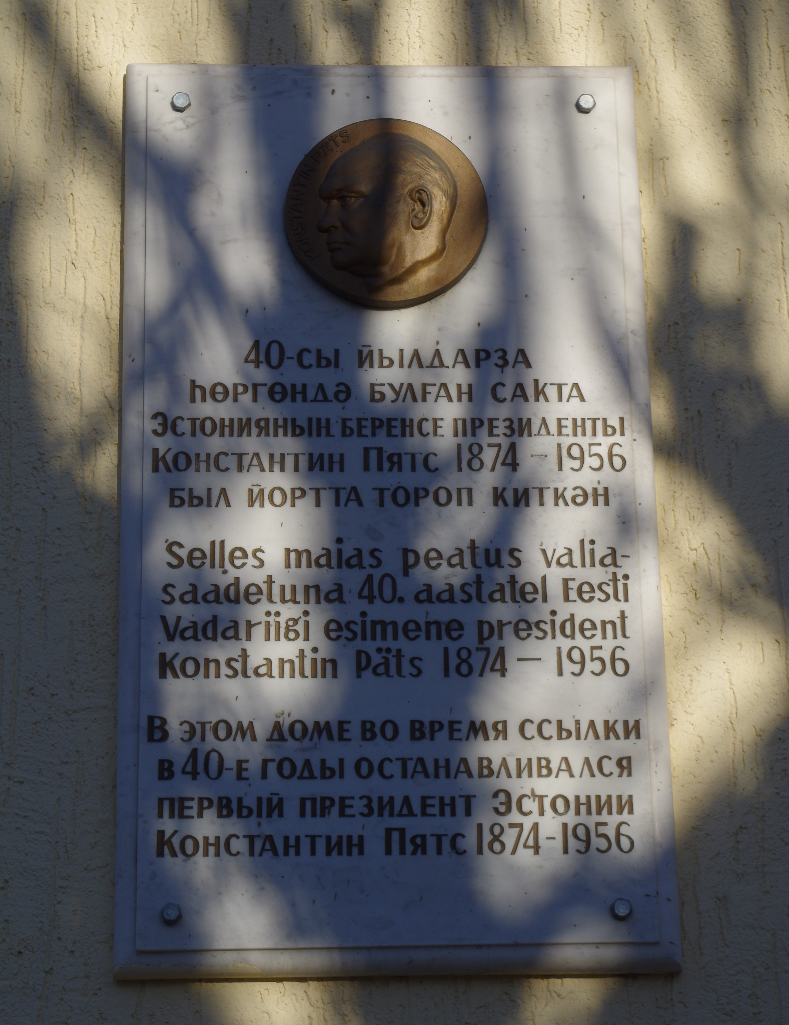 Mälestustahvel Konstantin Pätsile Ufas majal Kommunistitšeskaja tänav 37, kus Päts viibis pagenduses 1940-1941.